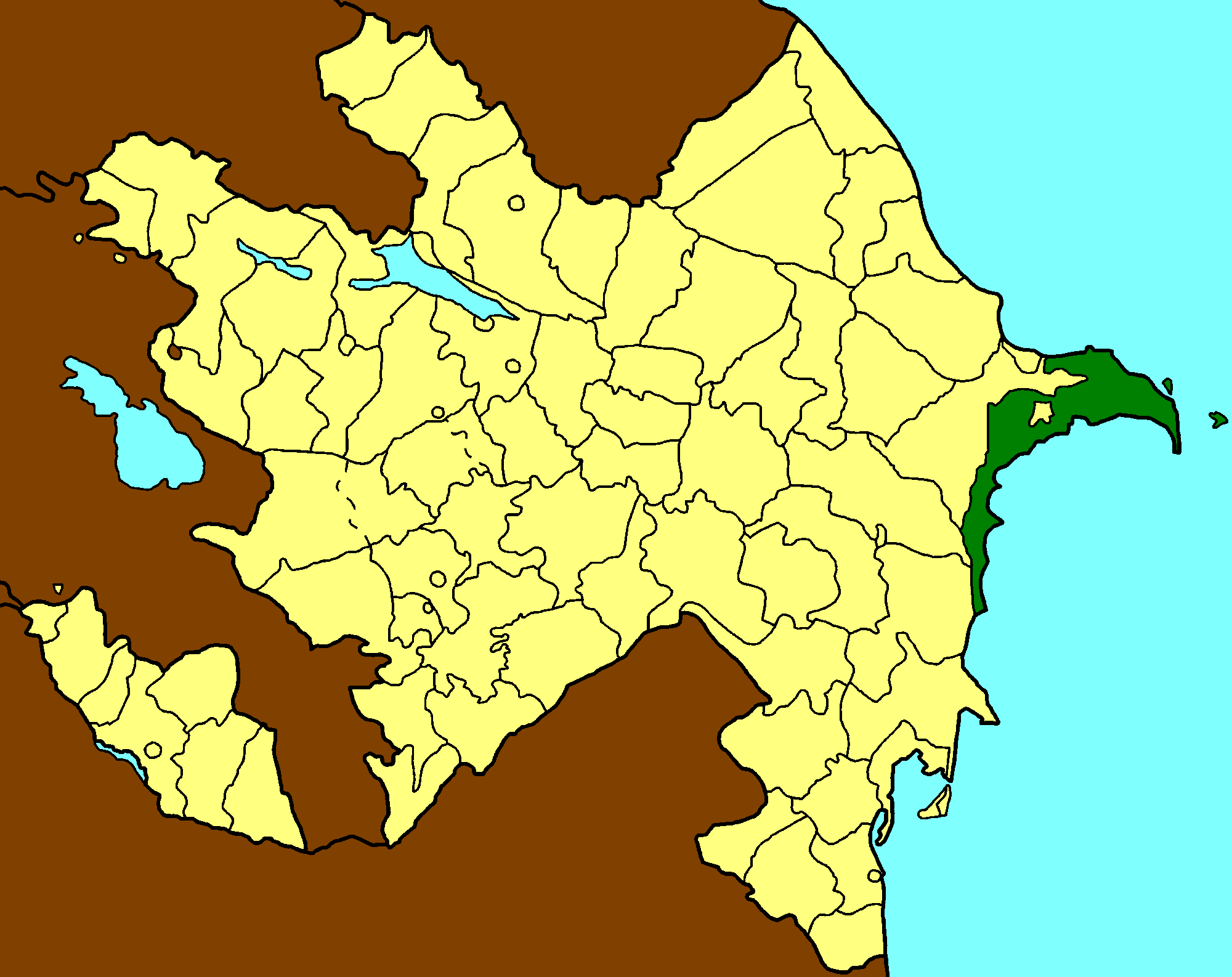 A-Baki